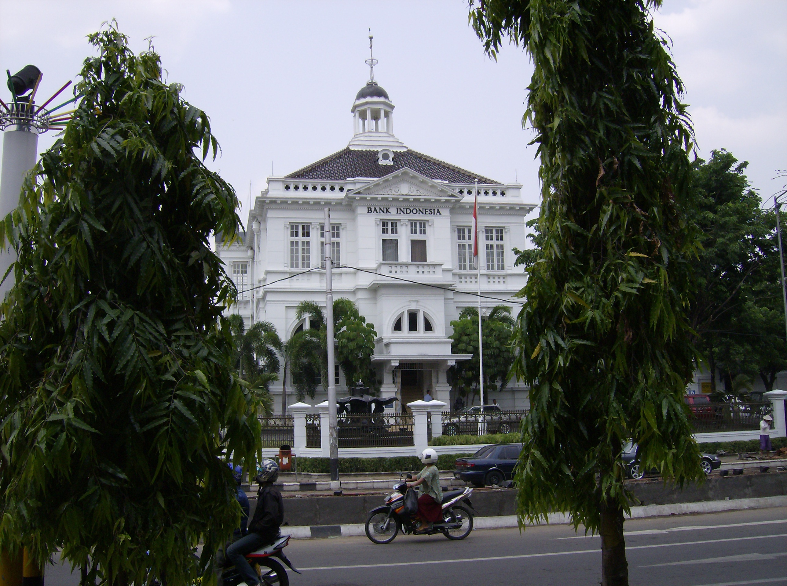 Bank Indonesia in Surakarta